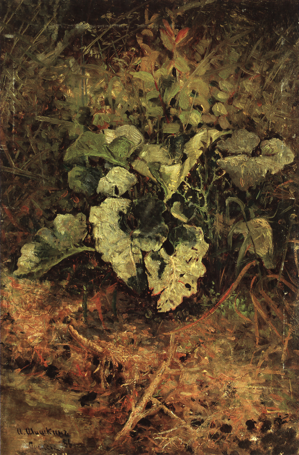 Картина Ивана Шишкина «Лопухи», созданная в 1880-е годы.